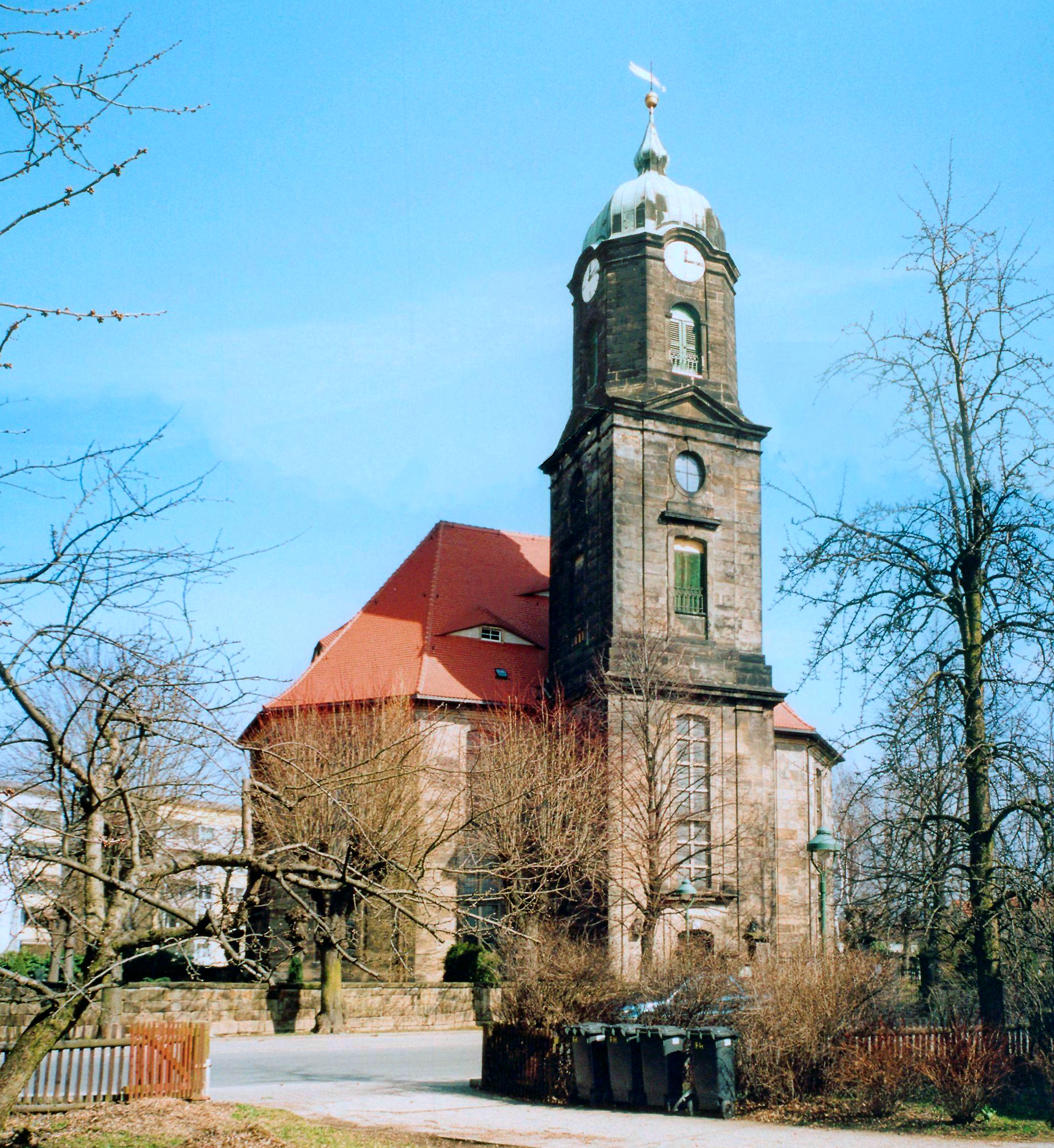 01.04.2001 01847 Lohmen, Dorfstraße (GMP: 50.989566,13.995545): Kirche, Barockbau von 1786-1789 von J. D. Kayser, Schüler des Erbauers der Dresdner Frauenkirche, George Bähr. Sicht von Südwesten. [F20010331A12+A13.jpg]20010401200MNR.JPG(c)Blobelt